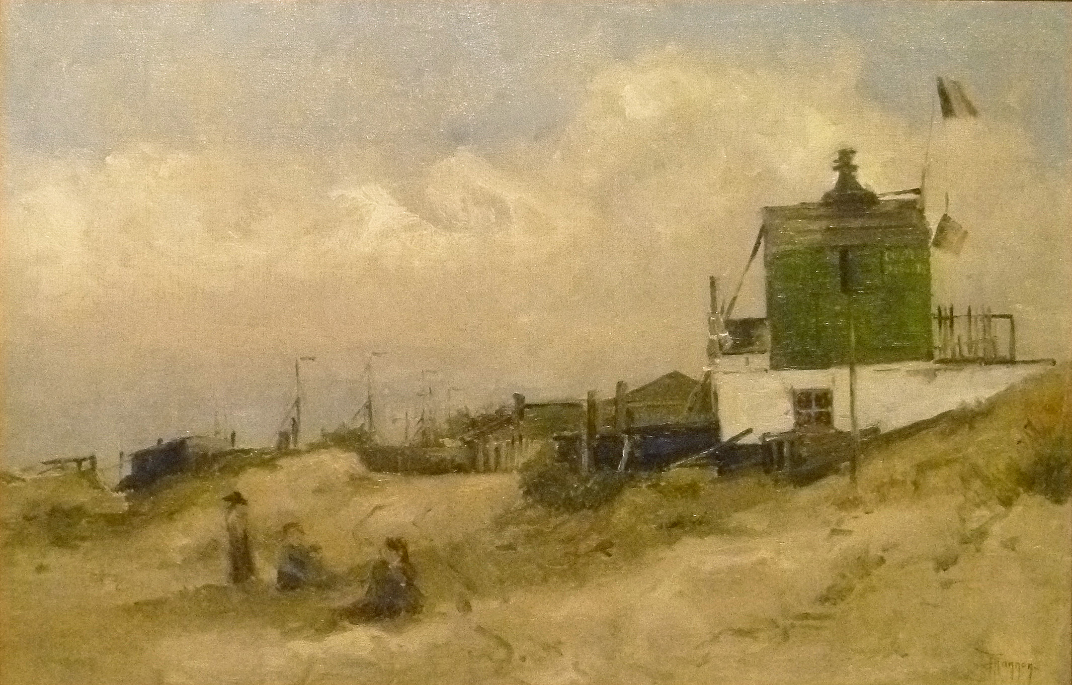 "De Camera Obscura" bij het Klein Strand te Oostende" (ca. 1880) door de Belgische kunstschilder Théo Hannon (1851-1916); collectie Stad Oostende in MuZee